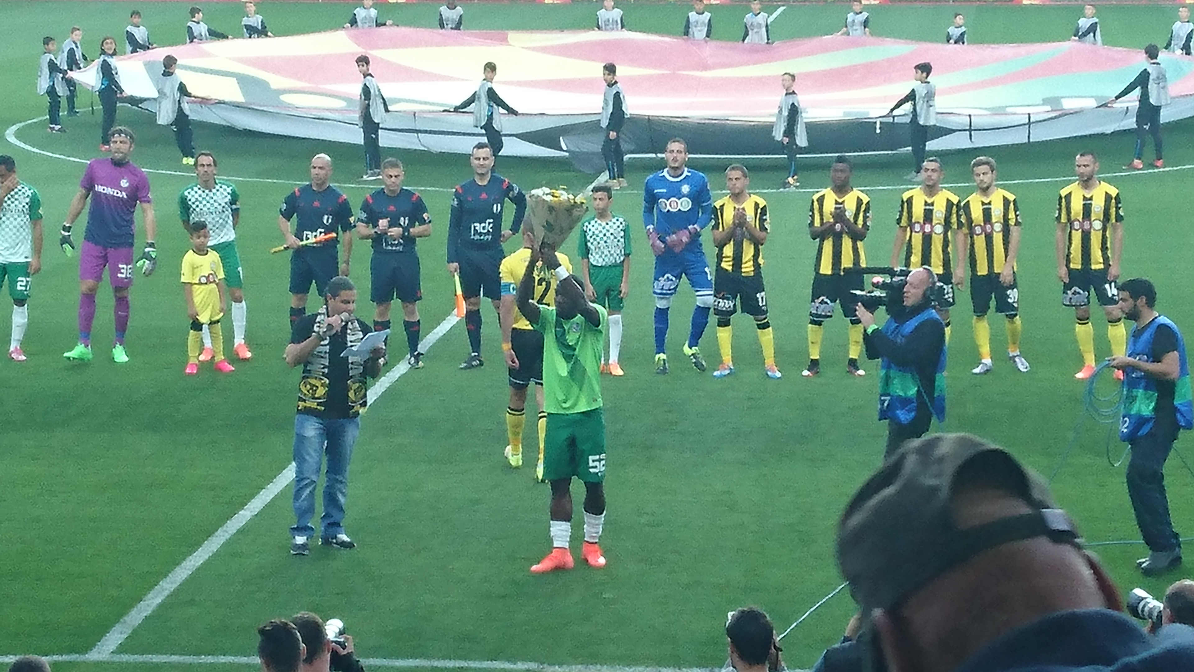 רומריו פירס זוכה להוקרה מקבוצתו לשעבר מכבי נתניה